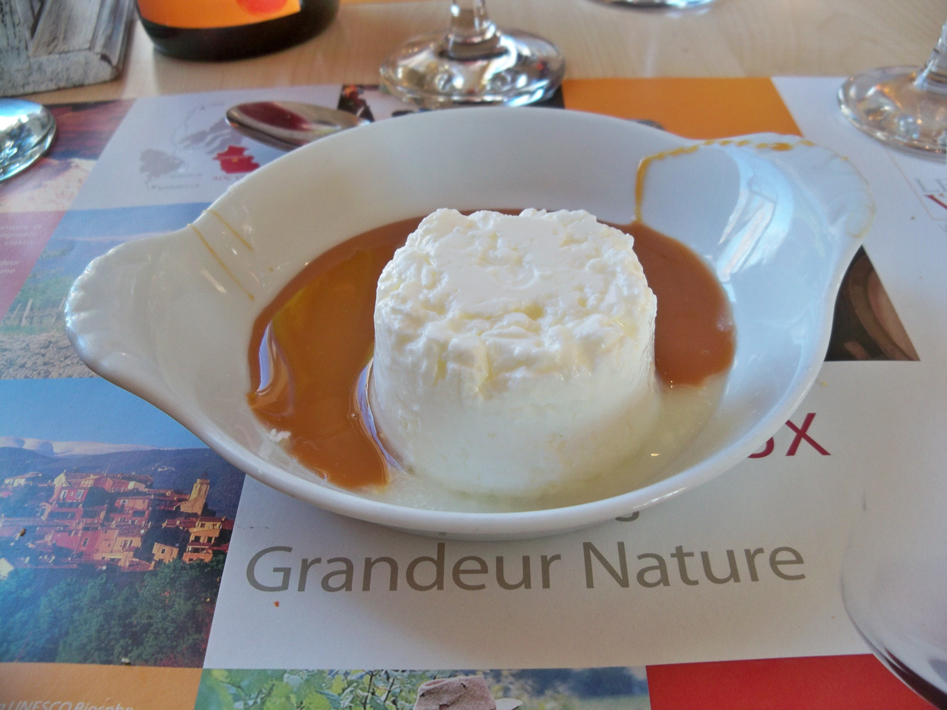 au Bistrot de Pays à Saint Trinit, Vaucluse, France